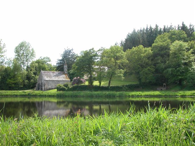 Chapelle de Notre-Dame de la Pitié, 22110 Mellionnec. Photo personnelle prise au mois de mai 2005.